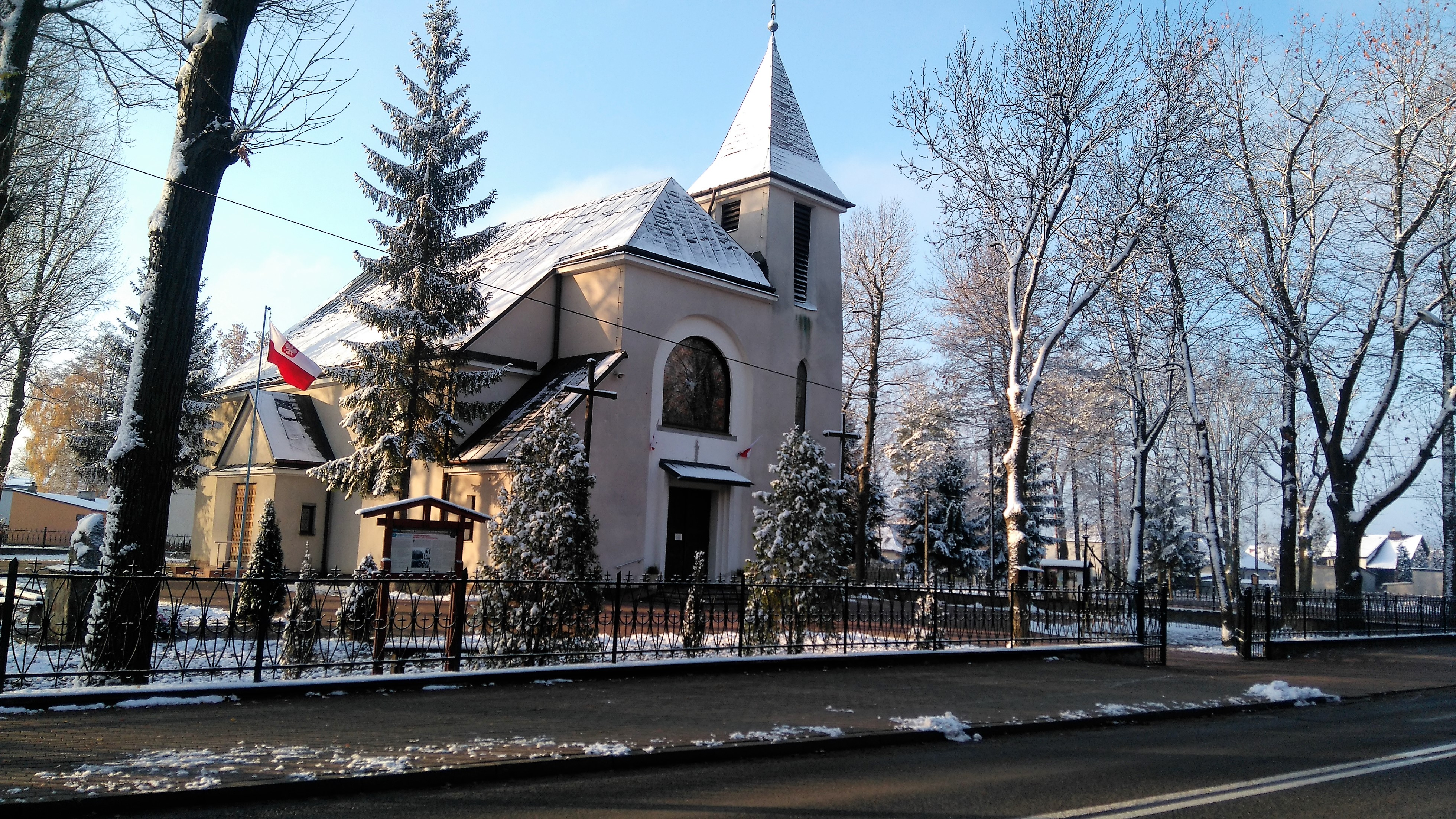 Celestynów, pl. Wyszyńskiego 3 - rzymskokatolicki kościół parafialny p.w. Wniebowzięcia Najświętszej Maryi Panny, 1930-1932.